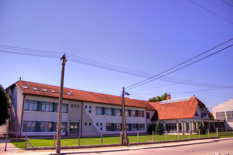 Kindergarten Hartian